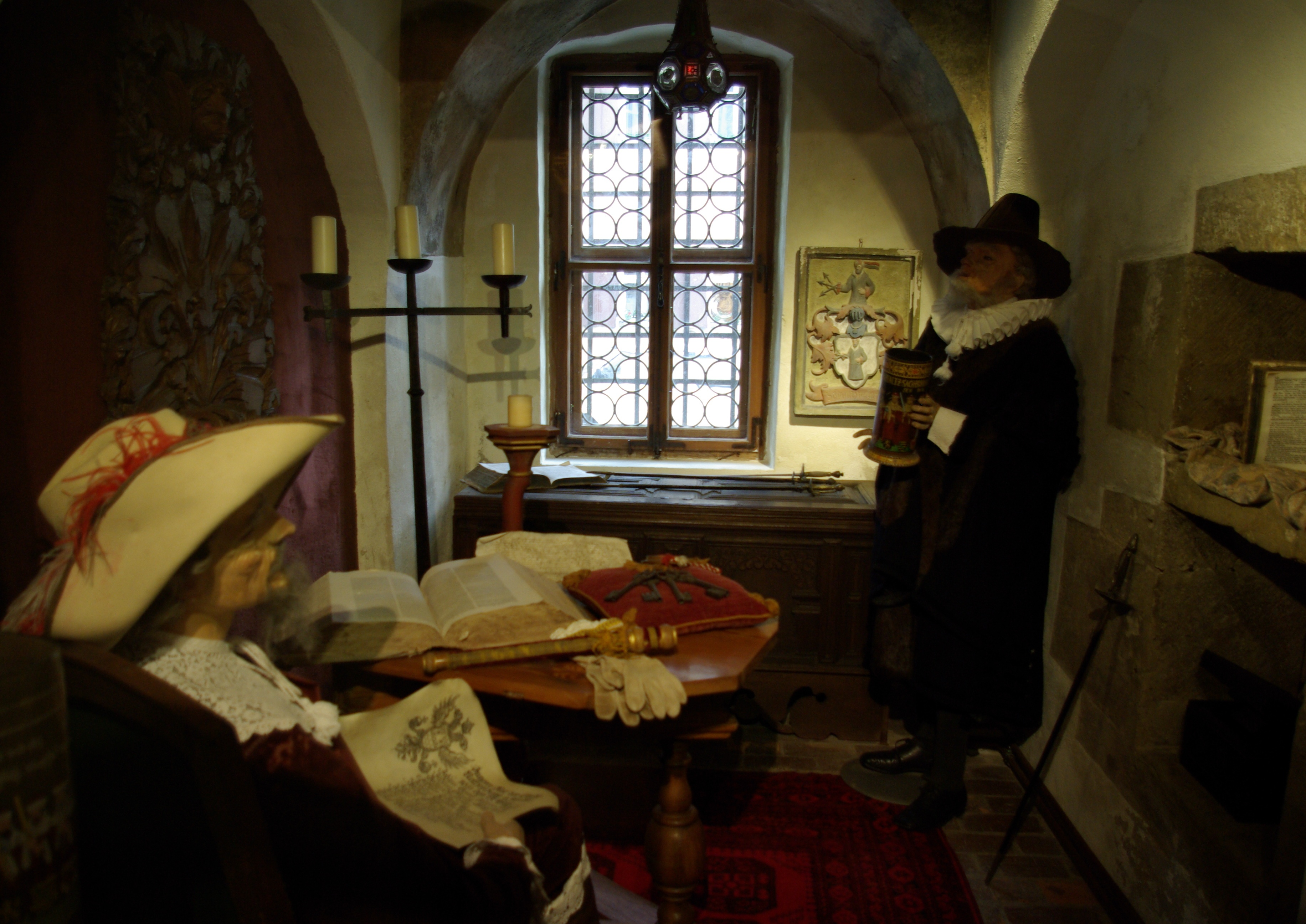 Nachbildung des Meistertrunks mit dem Grafen Tilly und dem Rothenburger Altbürgermeister Georg Nusch im Historiengewölbe im Rathaus von Rothenburg ob der Tauber